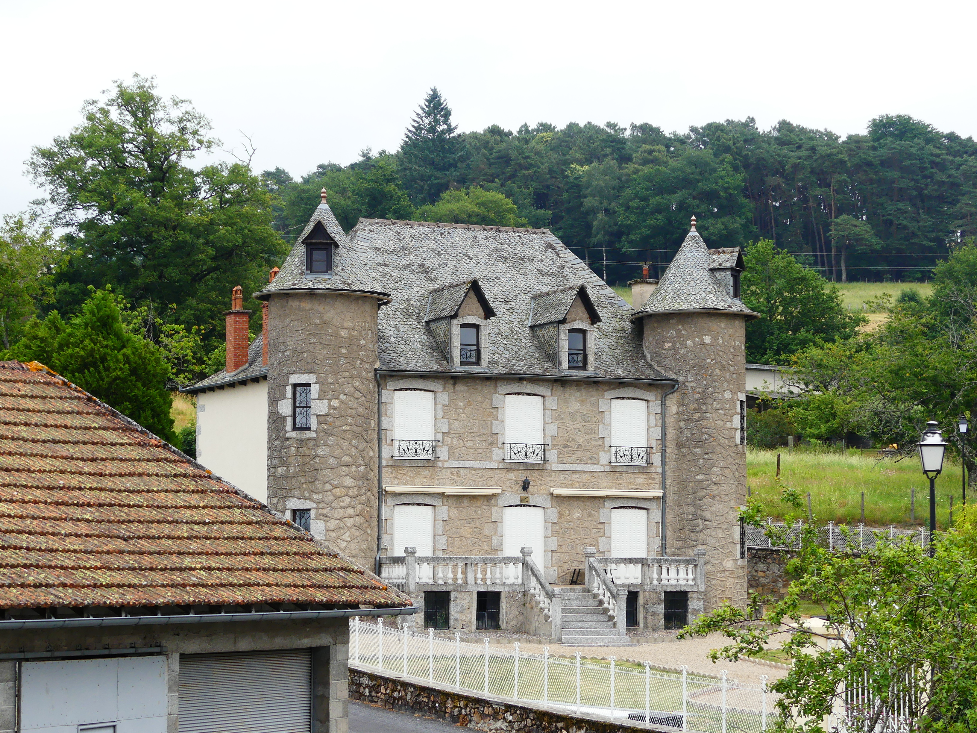 Manoir dans le bourg de Florentin, Florentin-la-Capelle, Aveyron, France.